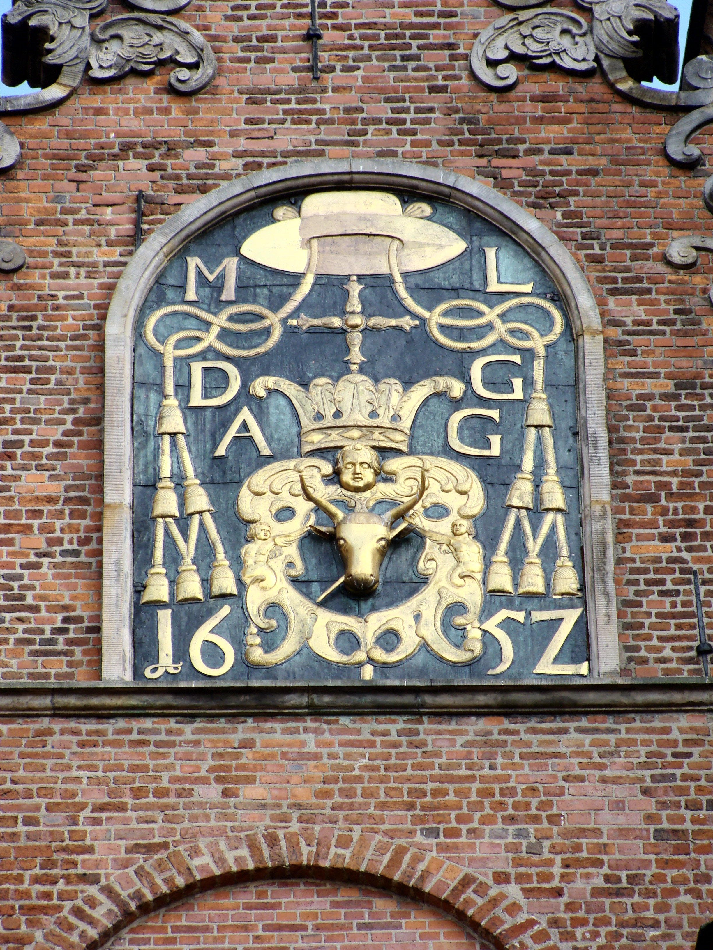 Fragment późnorenansowego szczytu między wieżami archikatedry gnieźnieńskiej z herbem prymasa Macieja Łubieńskiego